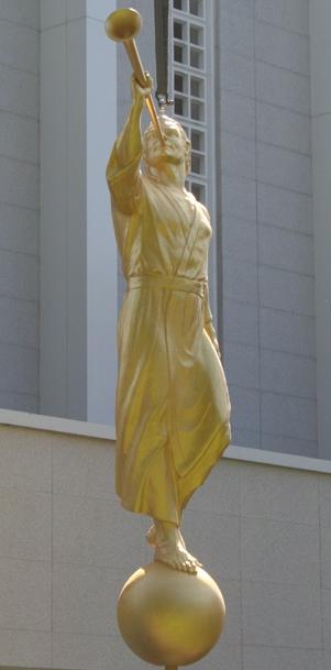 Die Engel-Moroni-Statue kurz vor der Montage auf den Bern-Tempel